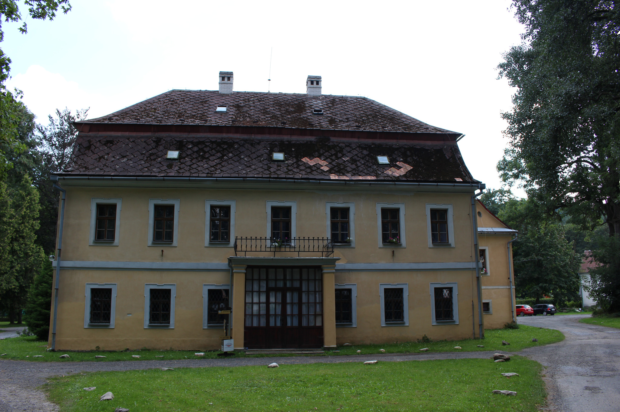 zámeček Grohmann, Vrbno pod Pradědem, okres Bruntál, Moravskoslezský kraj